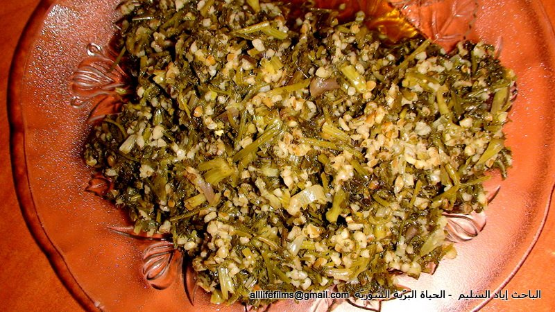 الحرتمنة